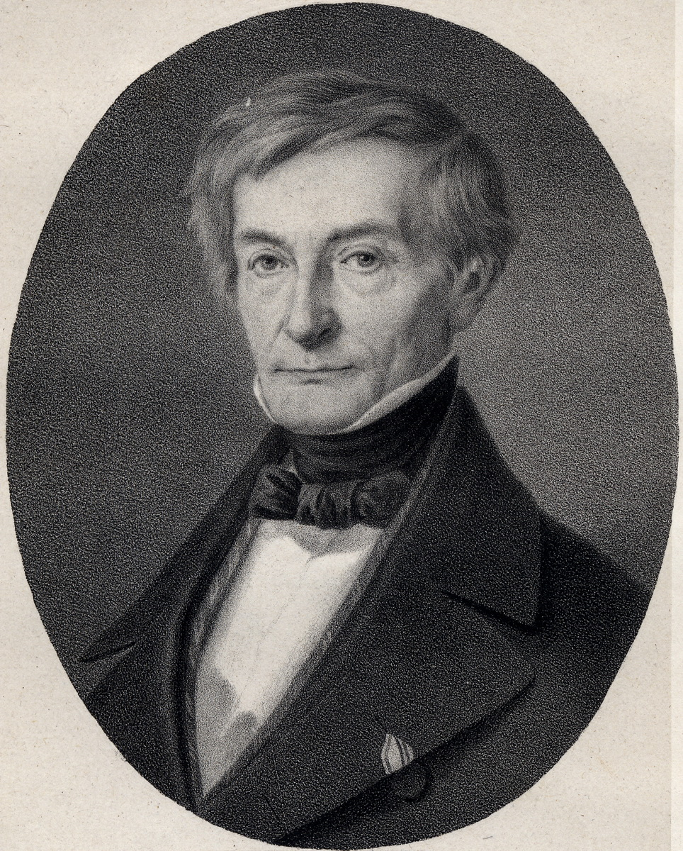 Portrait Carl Peter Lepsius, Naumburg (Saale), Lithographie um 1840 (?), Lith. Anst. v. W. Loeillot in Berlin